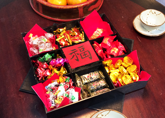 人稱「喫甜甜好過年」，如現代的巧克力、糖果、小餅乾等零嘴都能是年糖。而祭祀行儀時，仍用寸棗、天公豆（生仁）、麻荖、米荖、糕仔潤等傳統糖果。